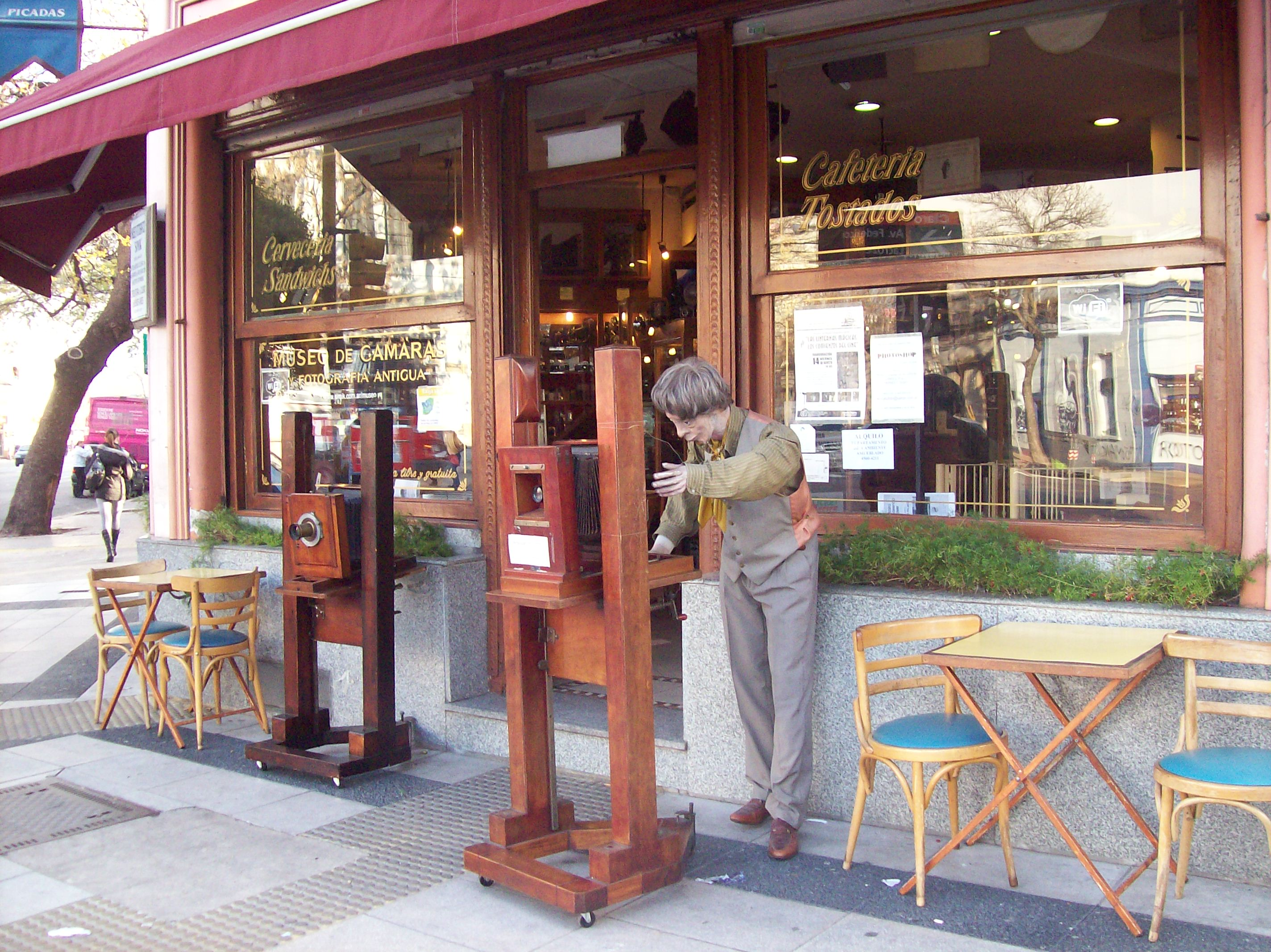 Museo Fotográfico Simik, en Chacarita, Buenos Aires, Argentina.